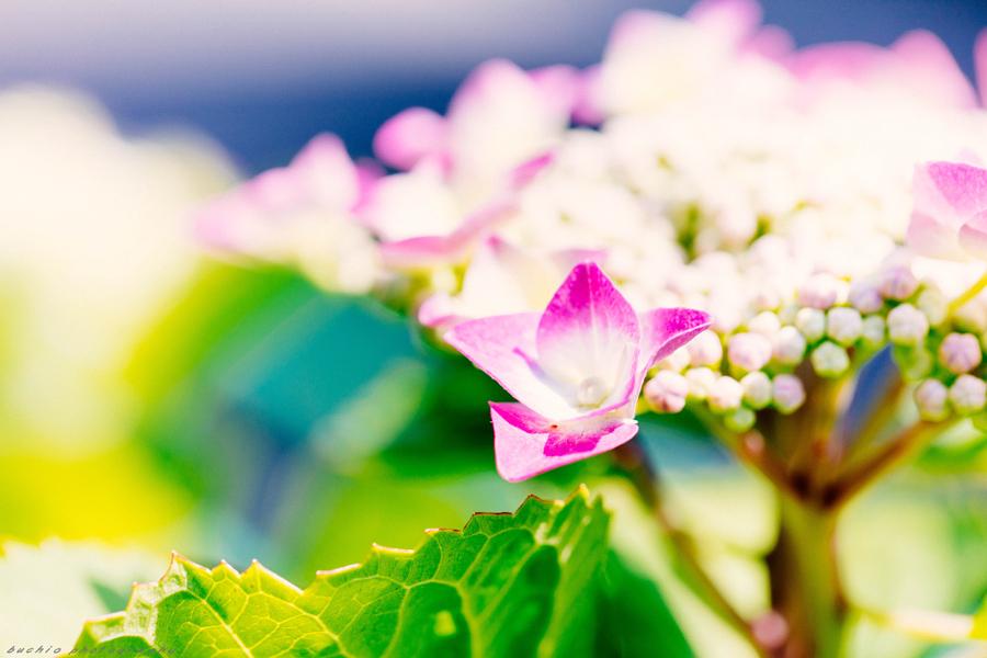 Гортензия